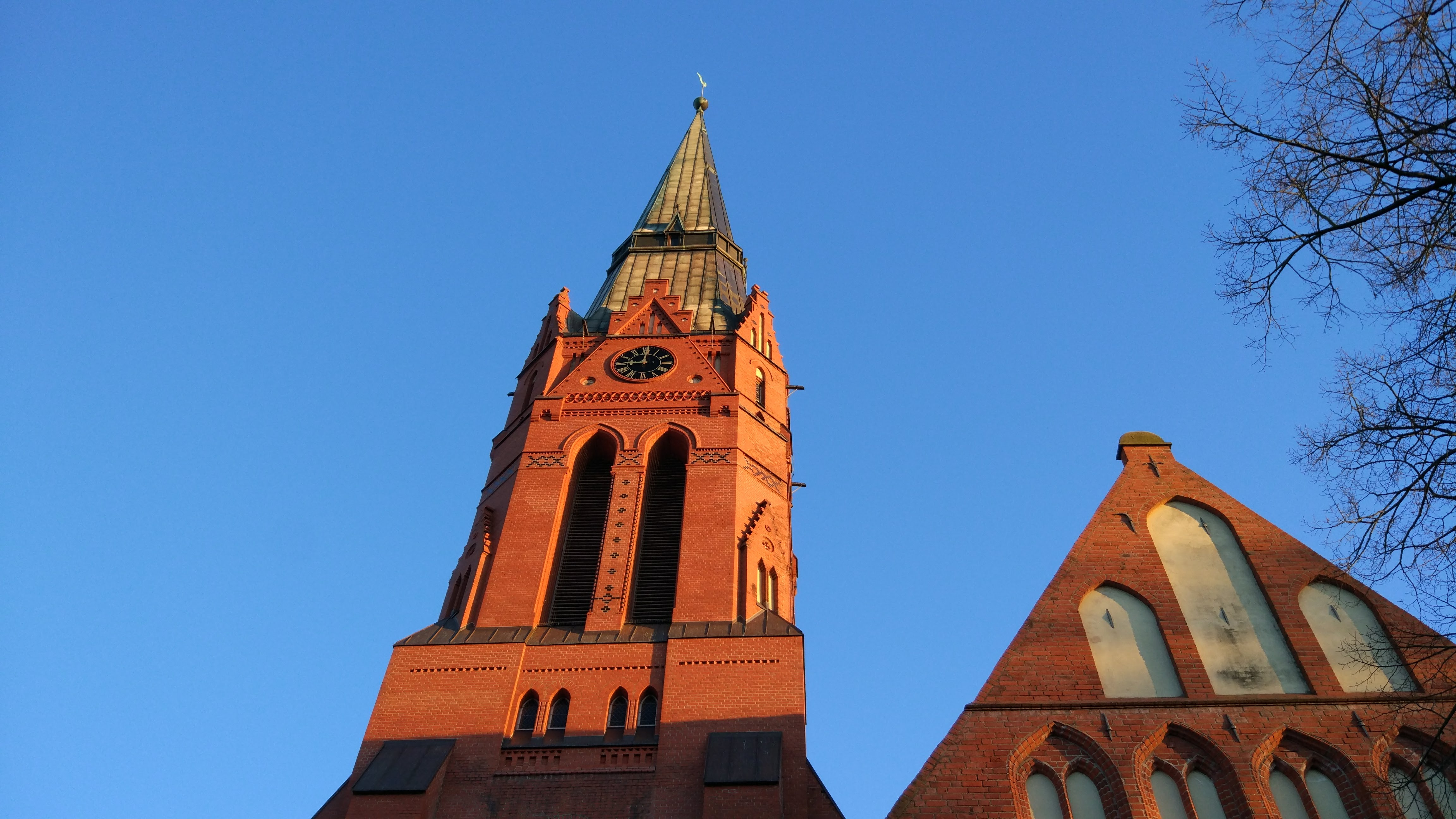 Südseite des Turms der Kirche St. Martin in Nienburg/Weser.